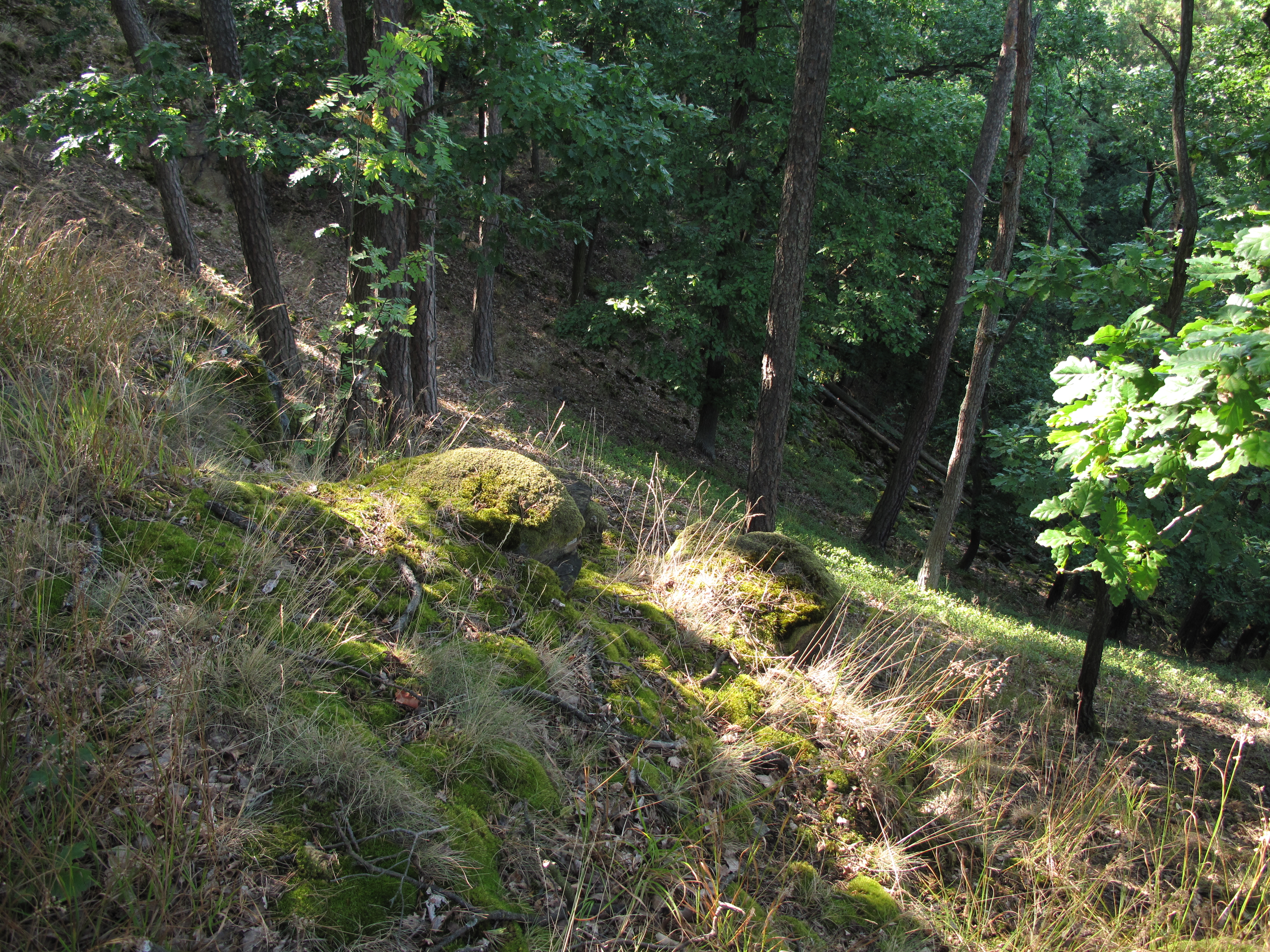 Přírodní památka Bílá skála u Jamolic. Okres Znojmo, Česká republika.